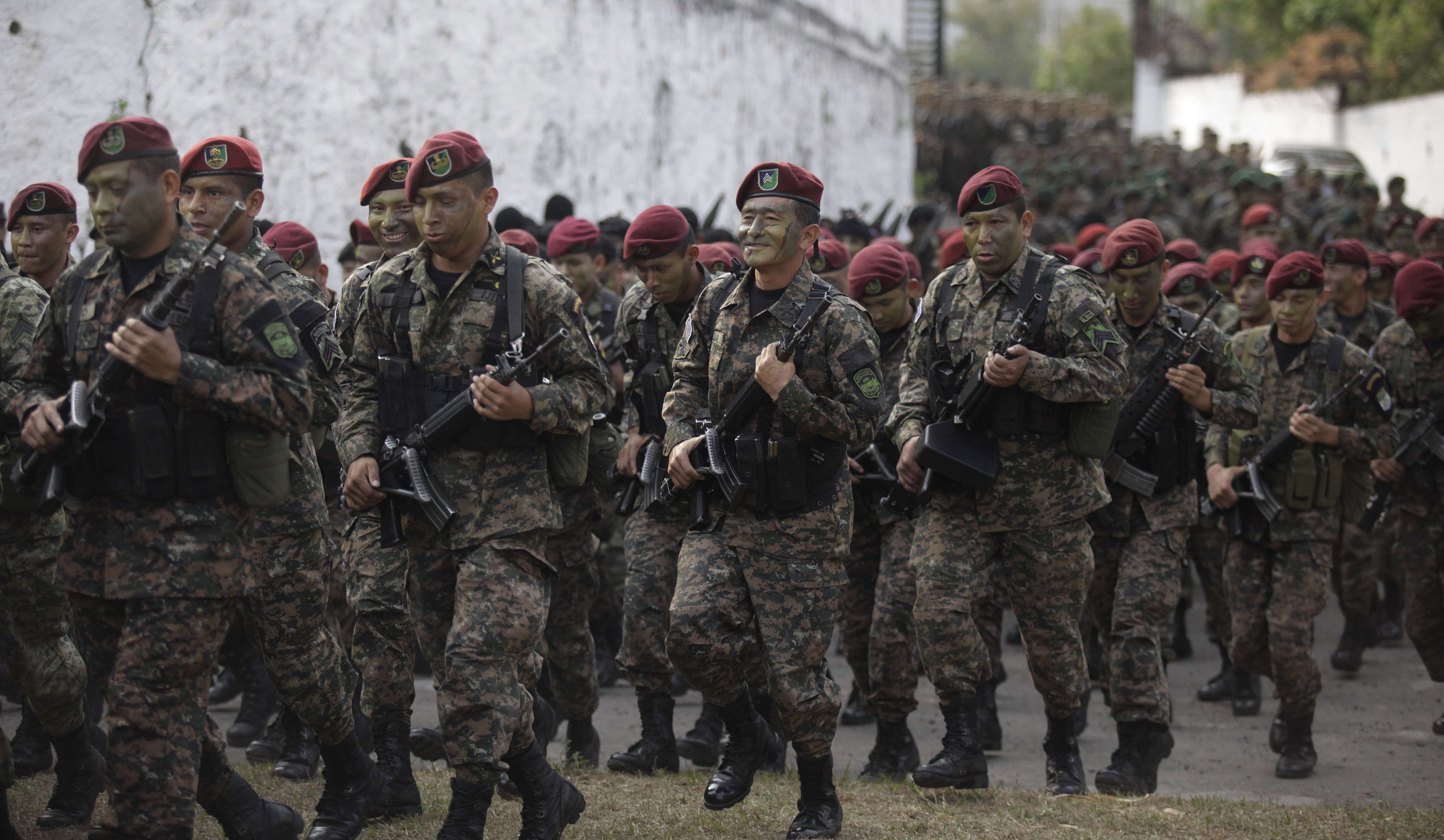 Lanzamiento de las Fuerzas Especailizadas de Reacción El Salvador, FES.